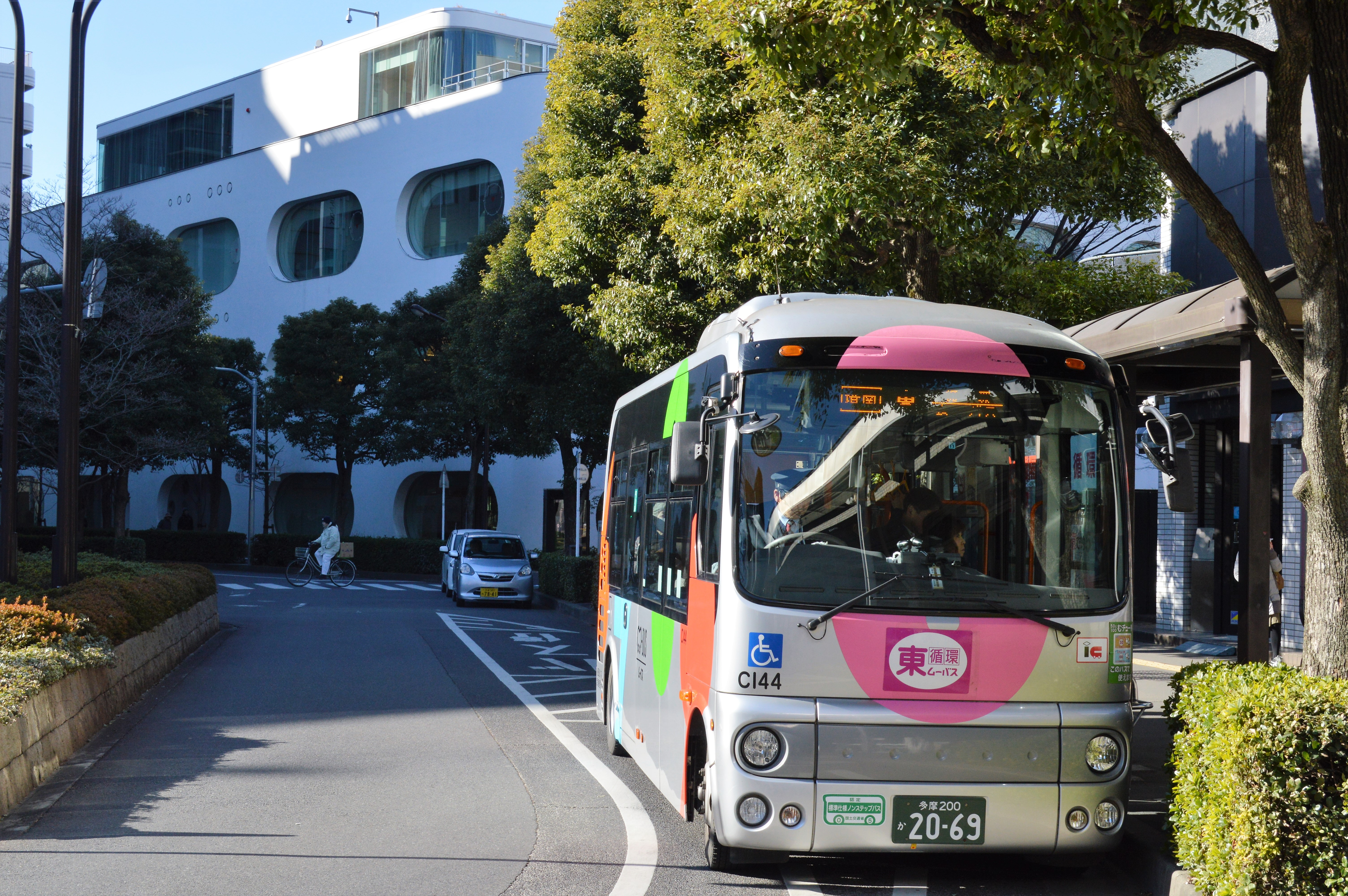 武蔵境駅北口のムーバスの停留所。奥は武蔵野プレイス。